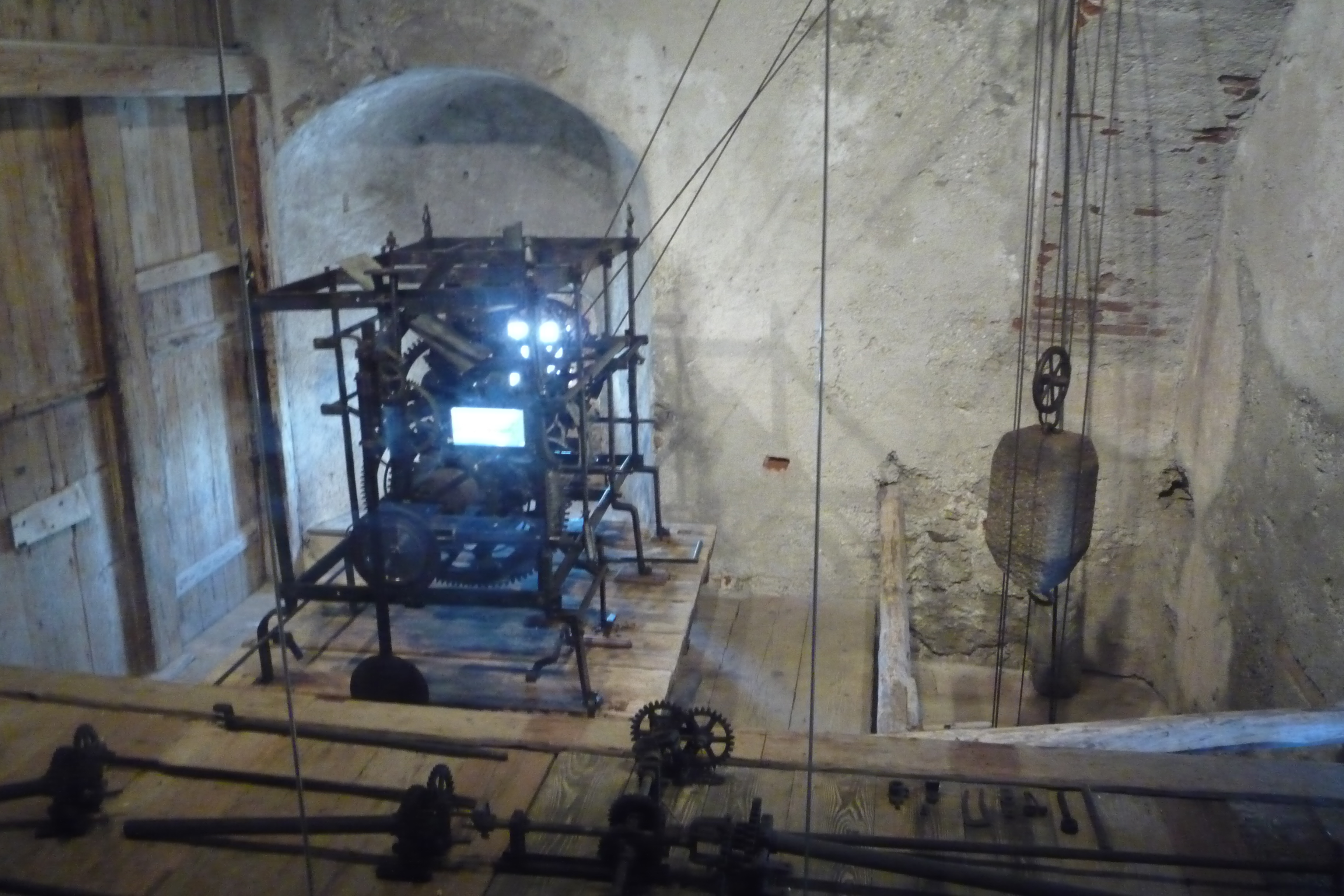 Uhrwerk im Stadtturm